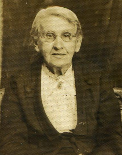 pessoa trajando casaco preto com blusa branca